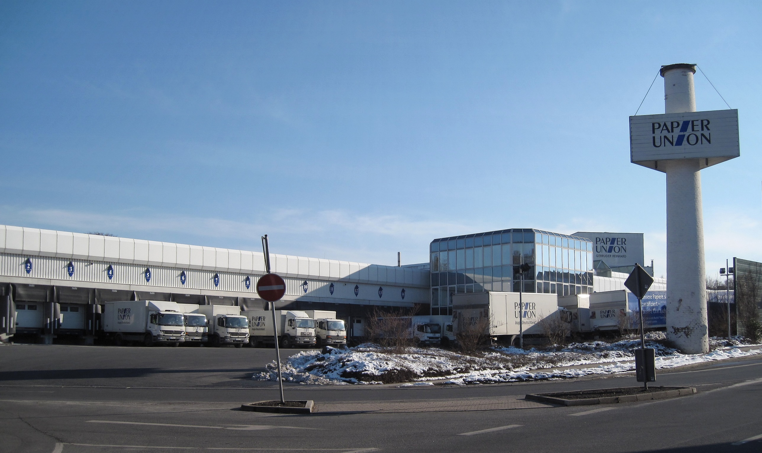 Logistikcenter der Papier Union in Hemer, Hauptstraße 293 bis 301.